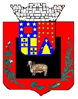 Brasão da cidade de Umbuzeiro, Paraíba, Brasil